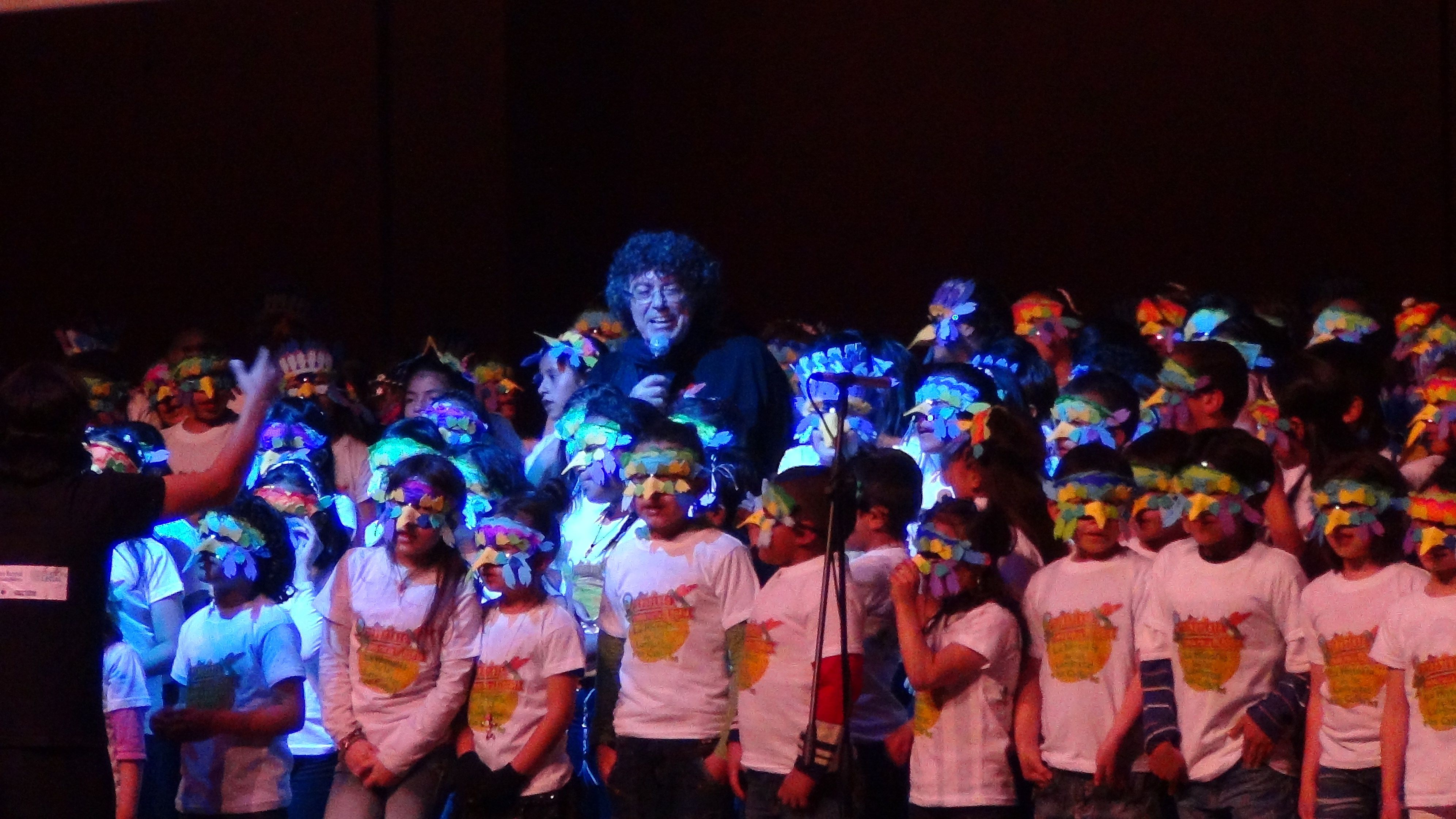 Cierre de la gira Monumento Sonoro de la Memoria. Bogotá, 2014